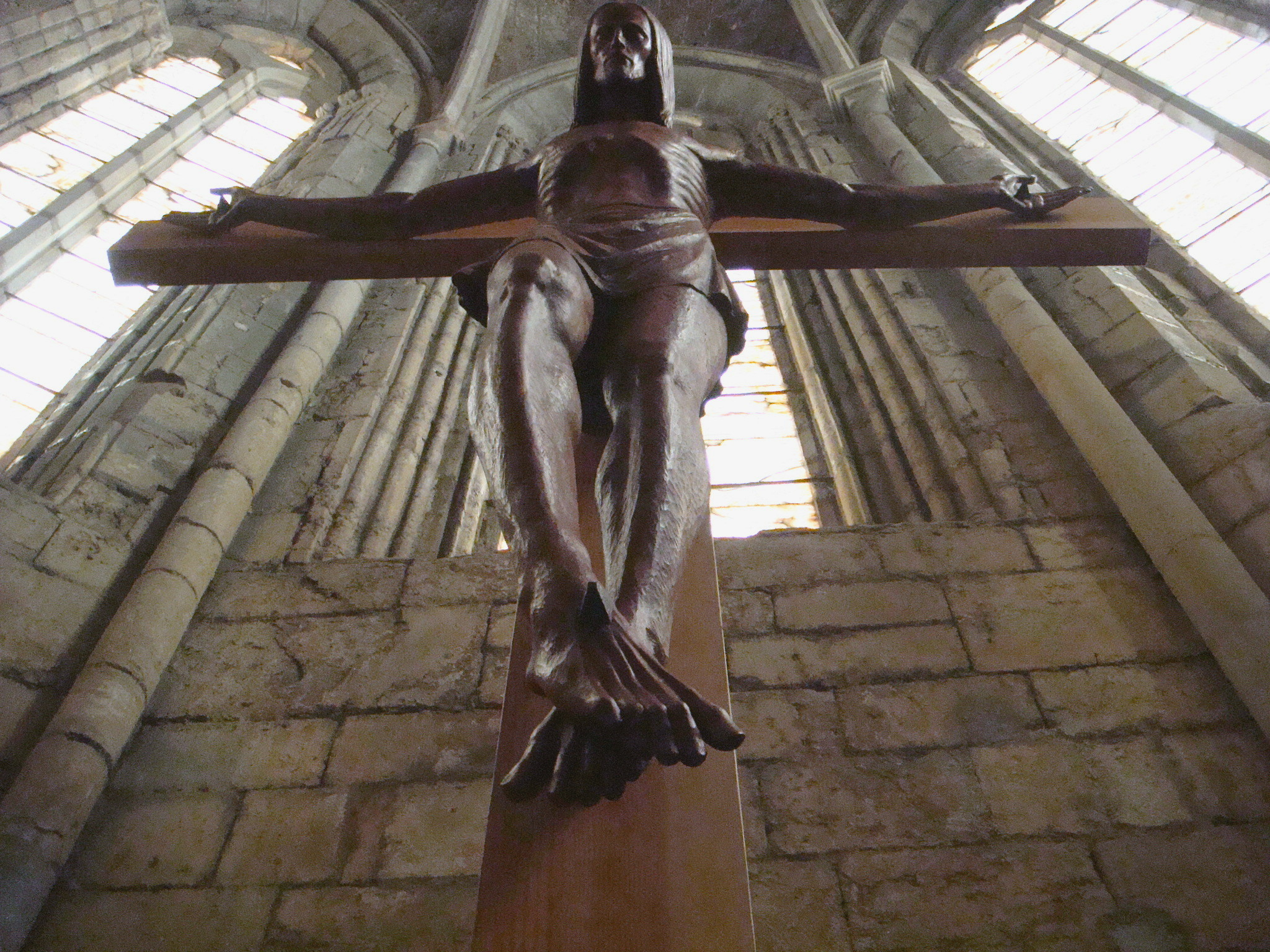 Cristo de la Paz en el Monasterio de Santa Maria de Benifassà